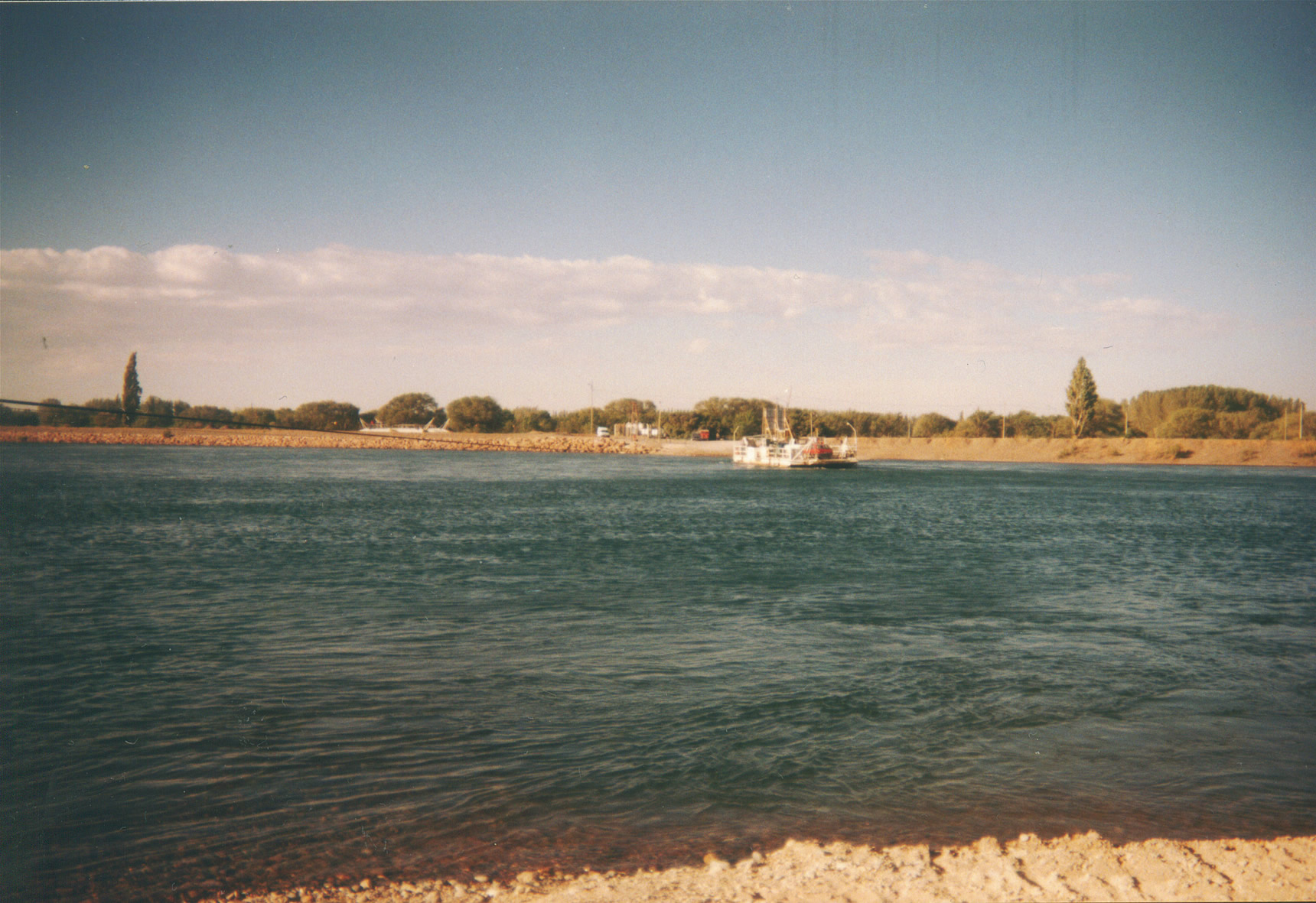 Antigua balsa en el Paso las Perlas sobre el Río Limay, límite natural entre las provincias de Río Negro y Neuquén, Argentina. Al fondo, provincia de Río Negro. Dicha balsa terminó sus operaciones el mismo año al inaugurarse el puente carretero sobre el río.